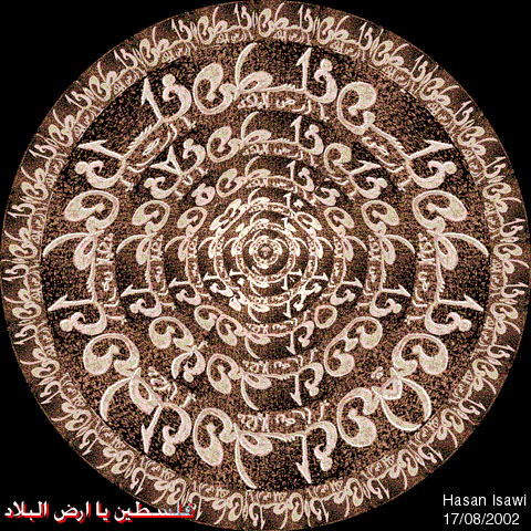 Link: مُنح الأذن رقم: OTRS #2006051010012313